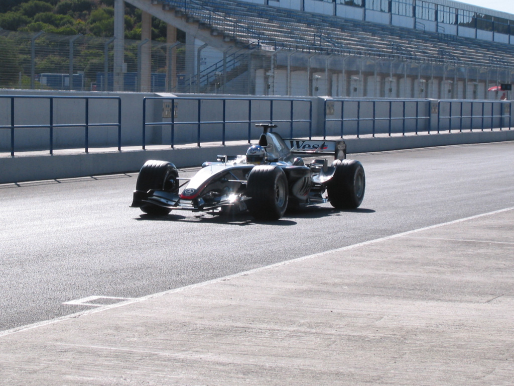 Circuito de Jerez; Jerez Circuit